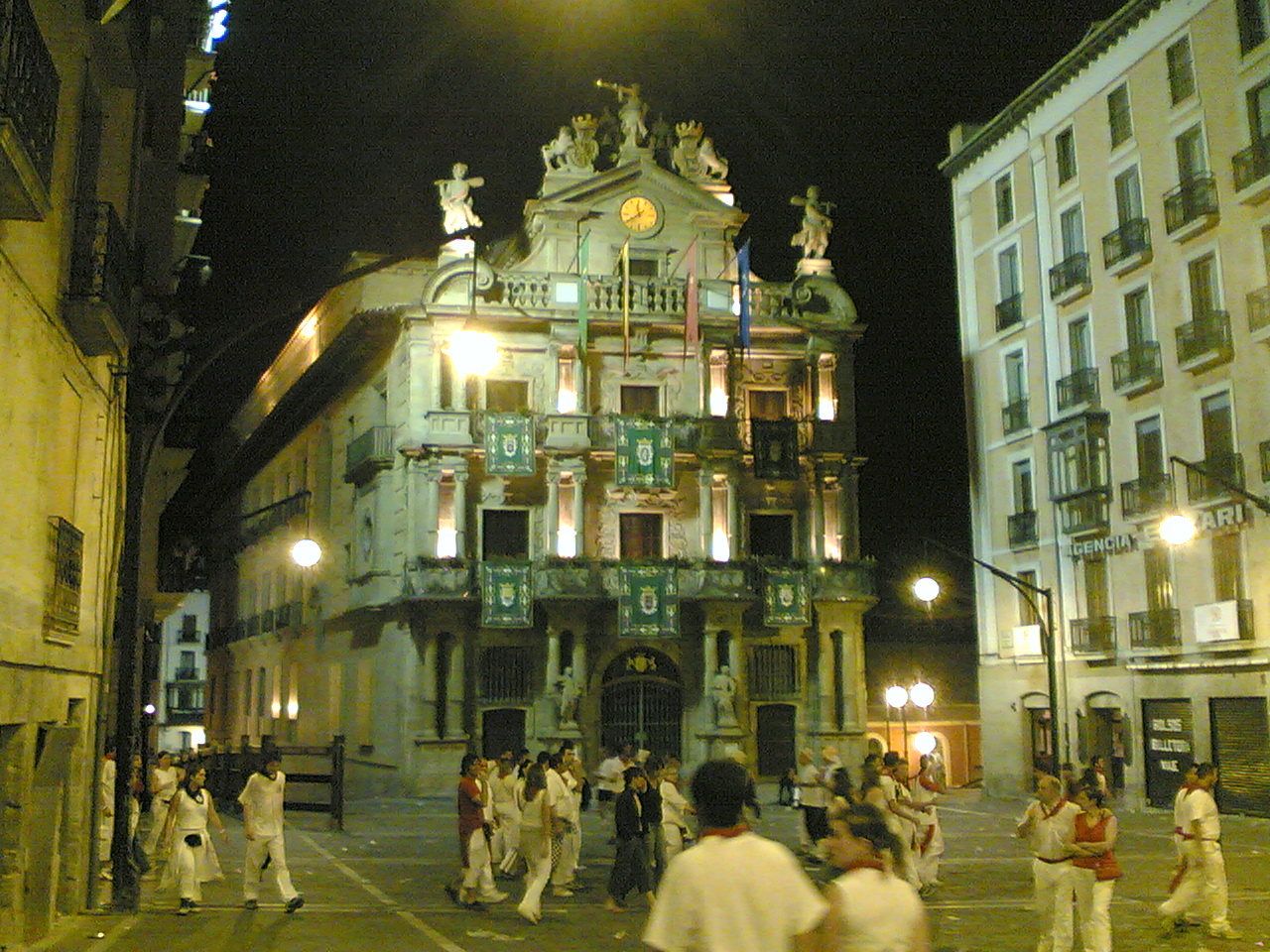 Ayuntamiento de Pamplona/Iruñea. Foto sacada durante los sanfermines 2006.